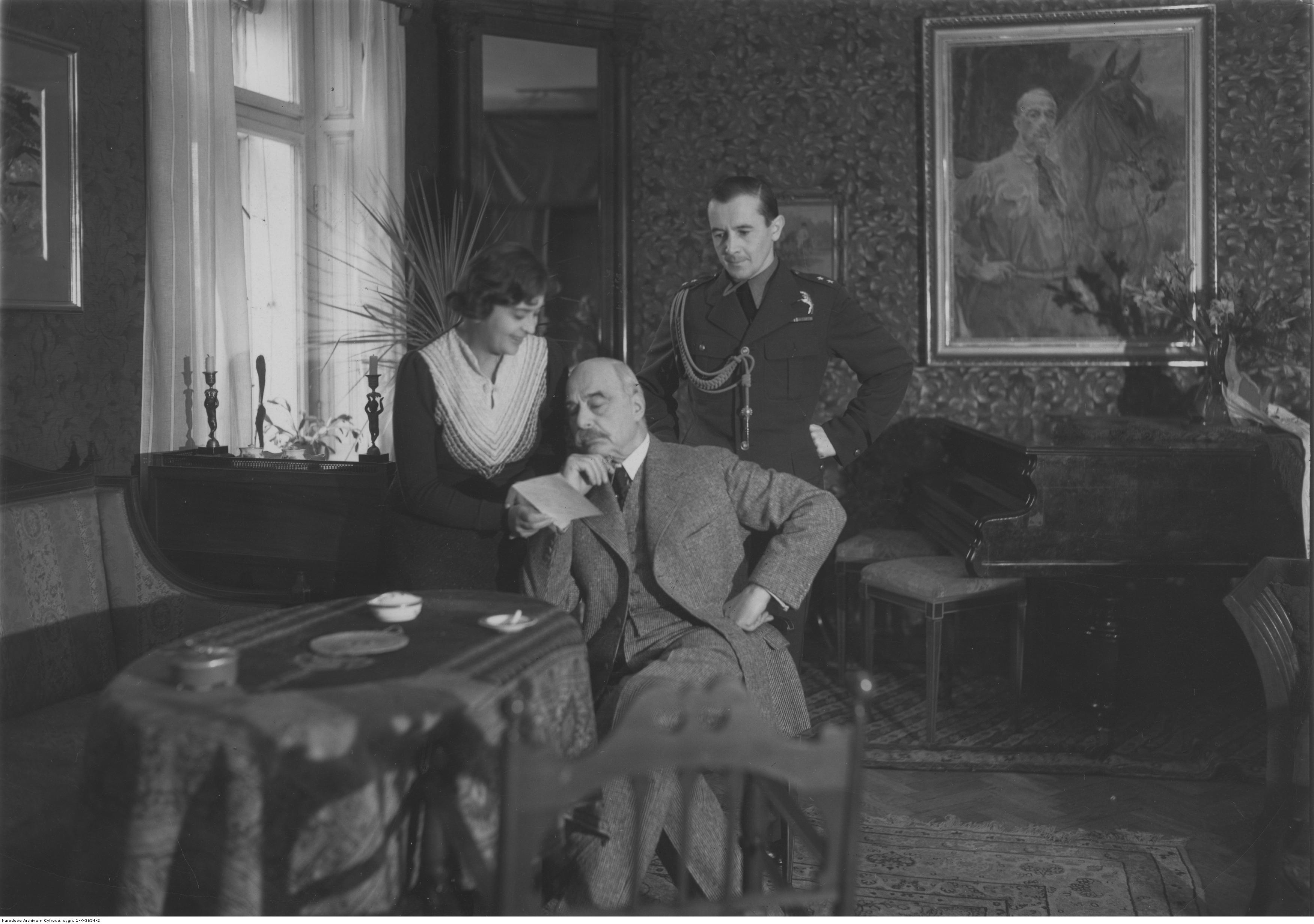 Wojciech Kossak, artysta malarz, z córką Magdaleną Samozwaniec i z mężem drugiej córki Marii Stefanem Jerzym Jasnorzewskim, w salonie swojej willi w Krakowie; 1936 r. Koncern Ilustrowany Kurier Codzienny - Archiwum Ilustracji. Sygnatura: 1-K-3654-2